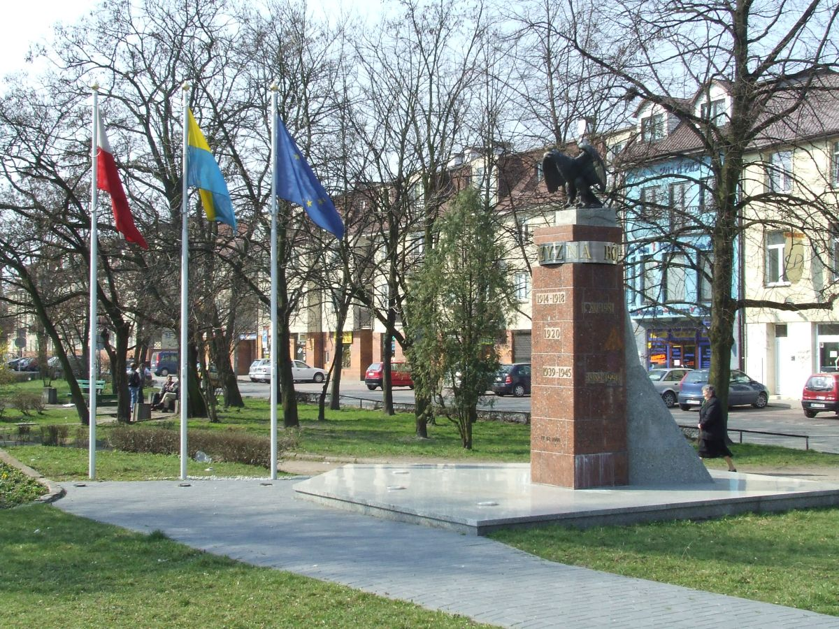 Mińsk Mazowiecki, pomnik na rynku